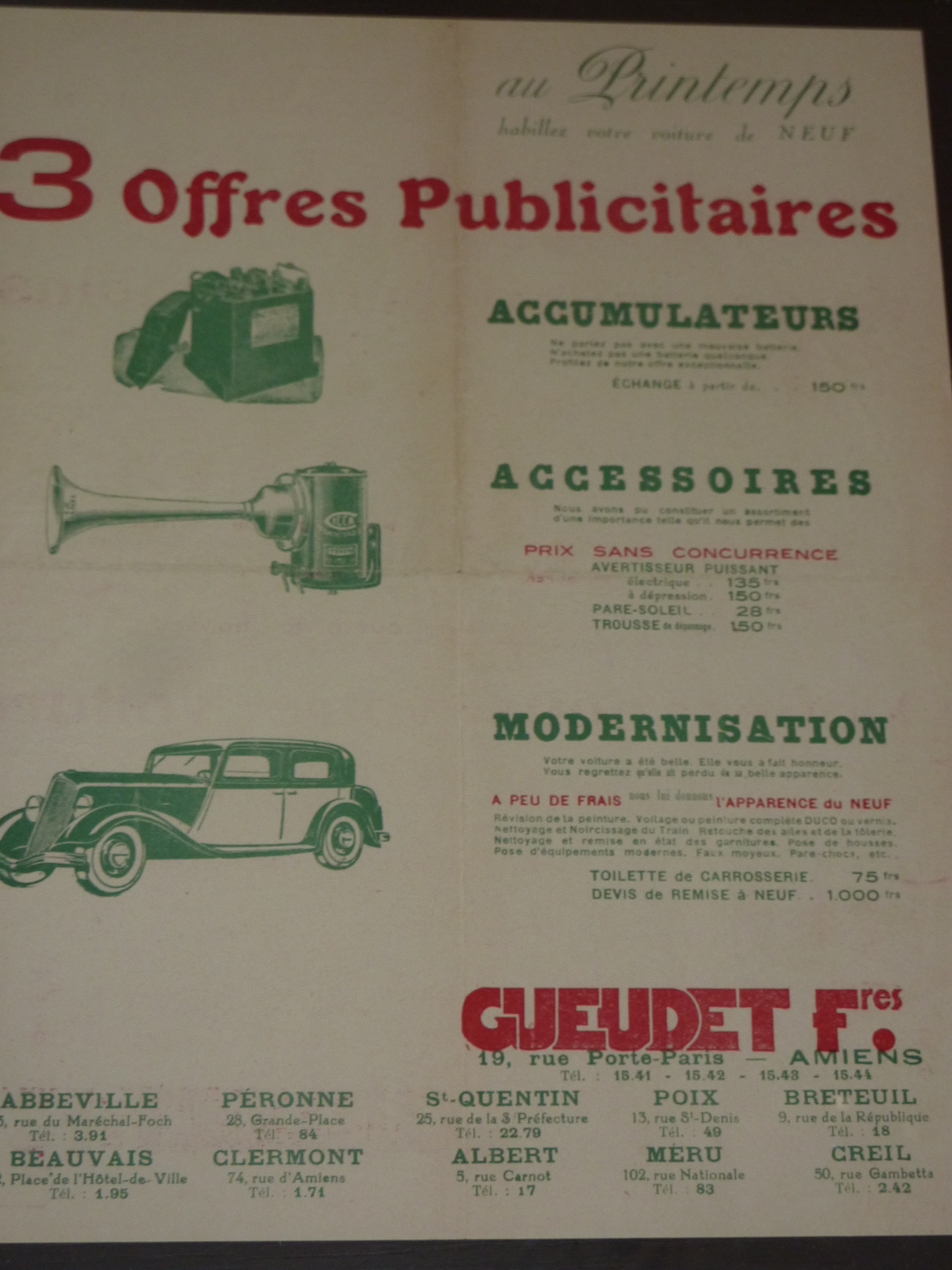 Publicité pour le groupe Gueudet dans la première moitié du XXème siècle